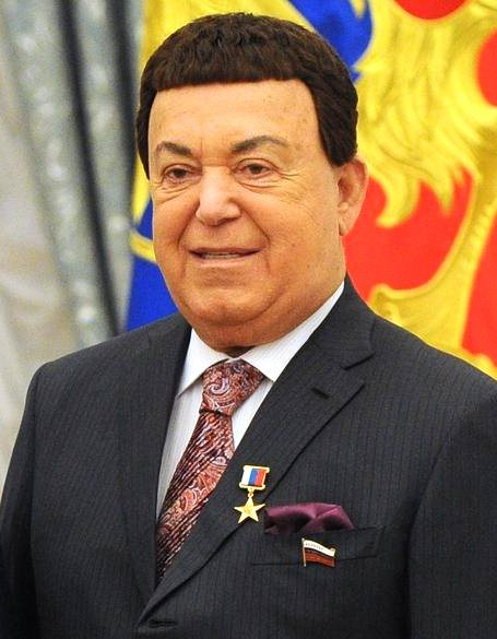 Иосиф Давыдович Кобзон на церемонии вручения медалей «Герой Труда Российской Федерации» в Московском Кремле 30 апреля 2016 года.